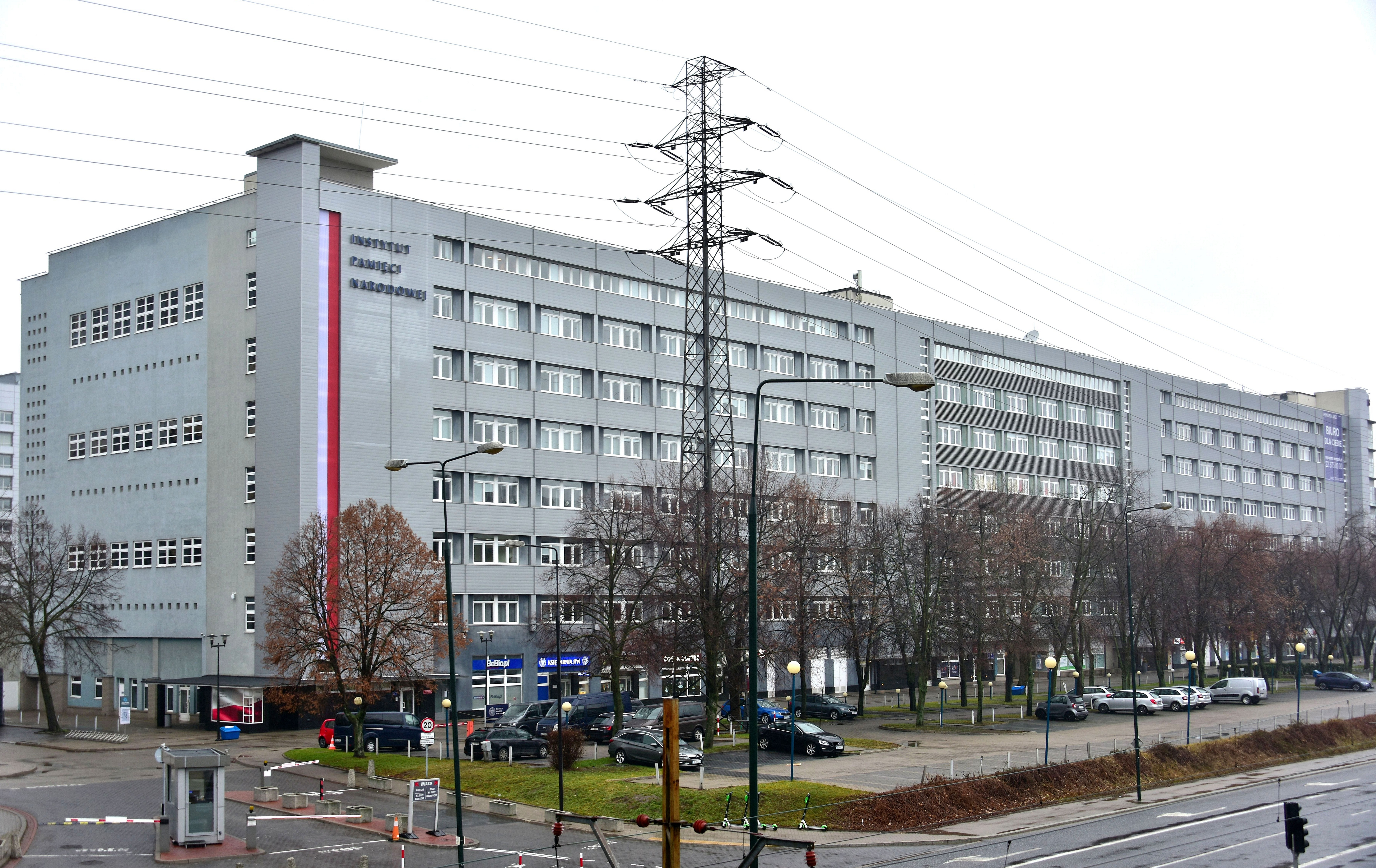 Siedziba Instytutu Pamięci Narodowej przy ul. Wołoskiej 7 w Warszawie